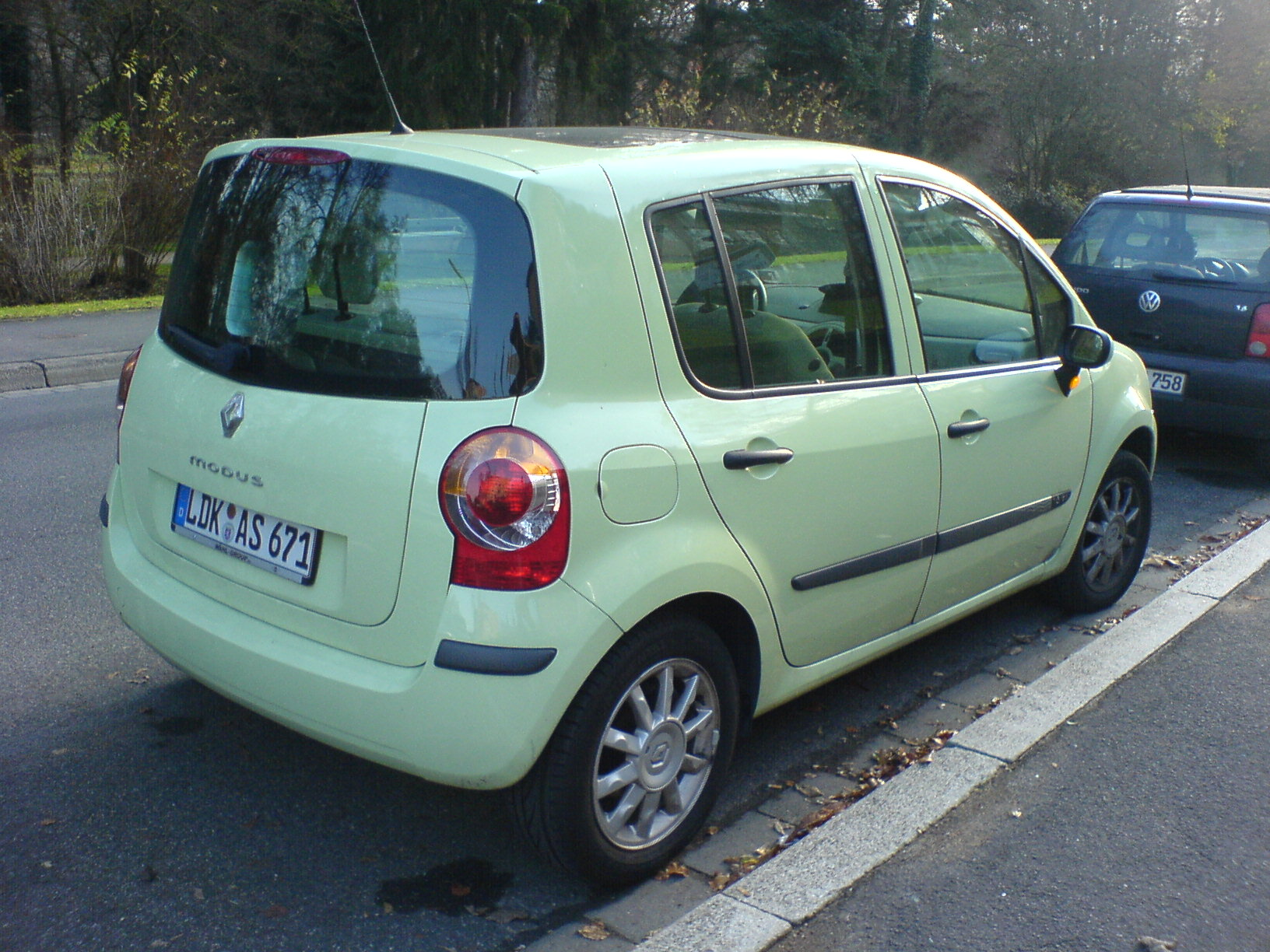 Renault Modus, thymiangrün - außen, hr.